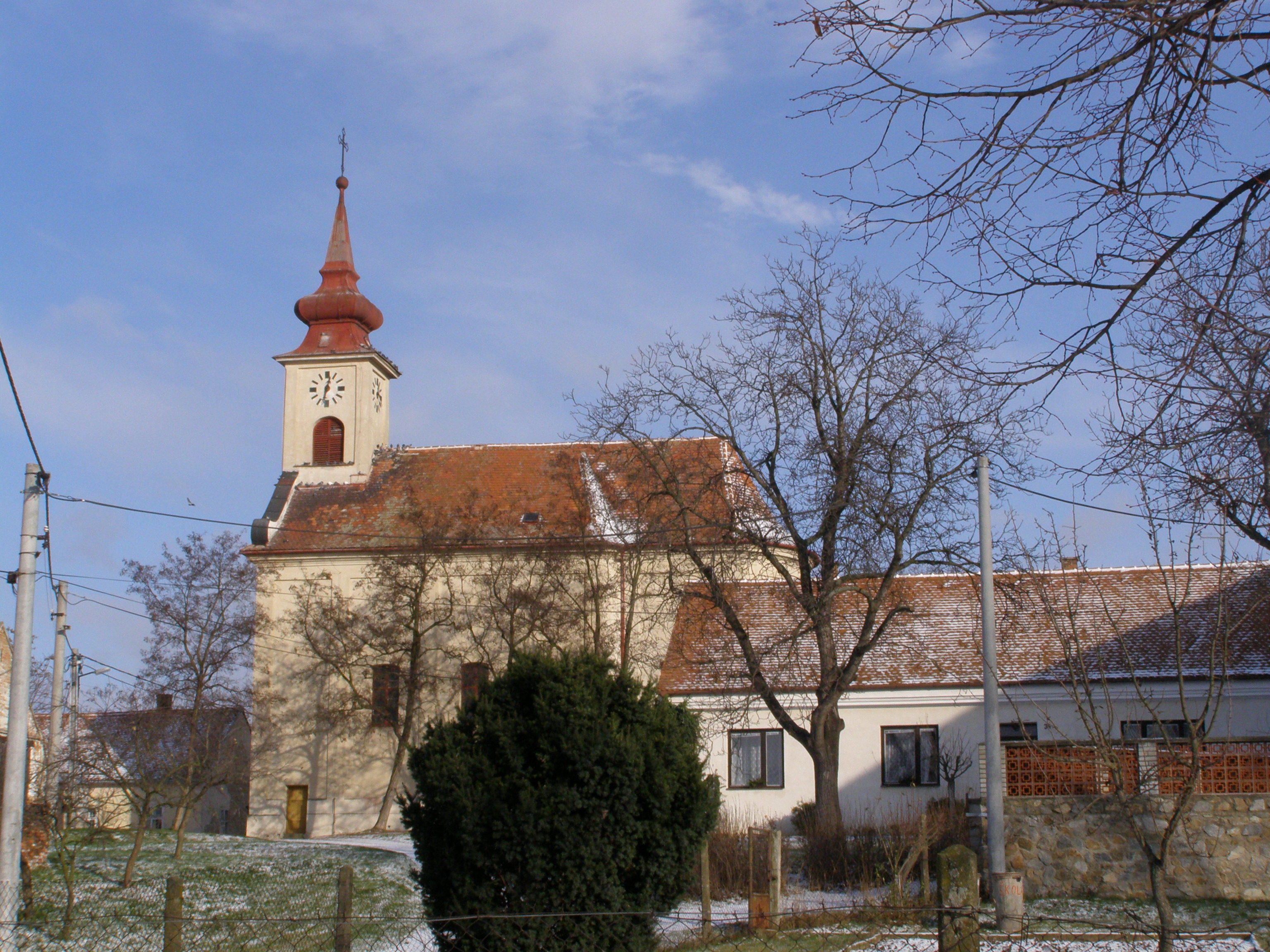 Brod nad Dyjí, kostel svatého Jana Nepomuckého